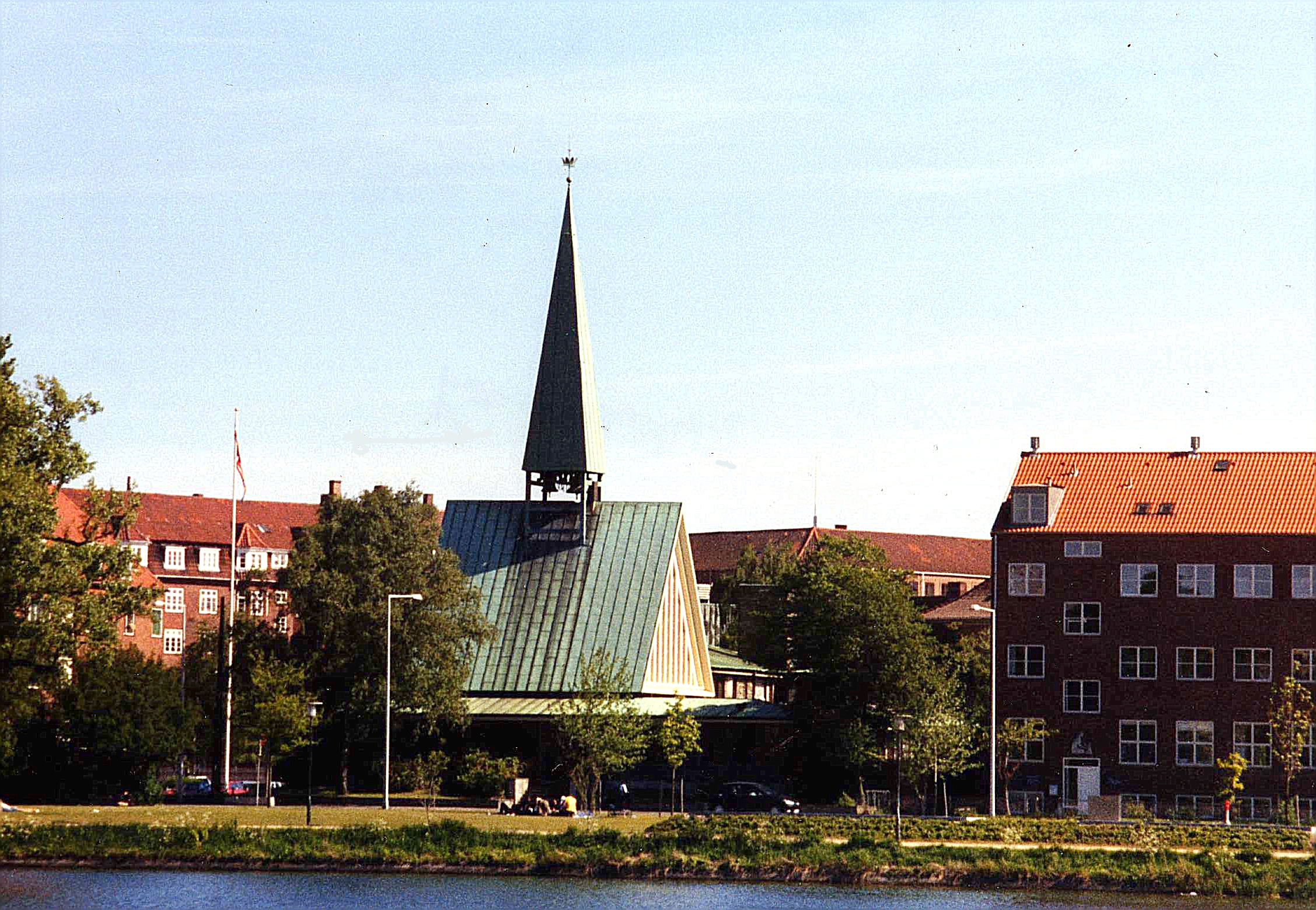 Kong Haakons Kirke, Københavns Kommune